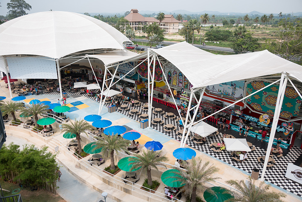 Foodville CNA